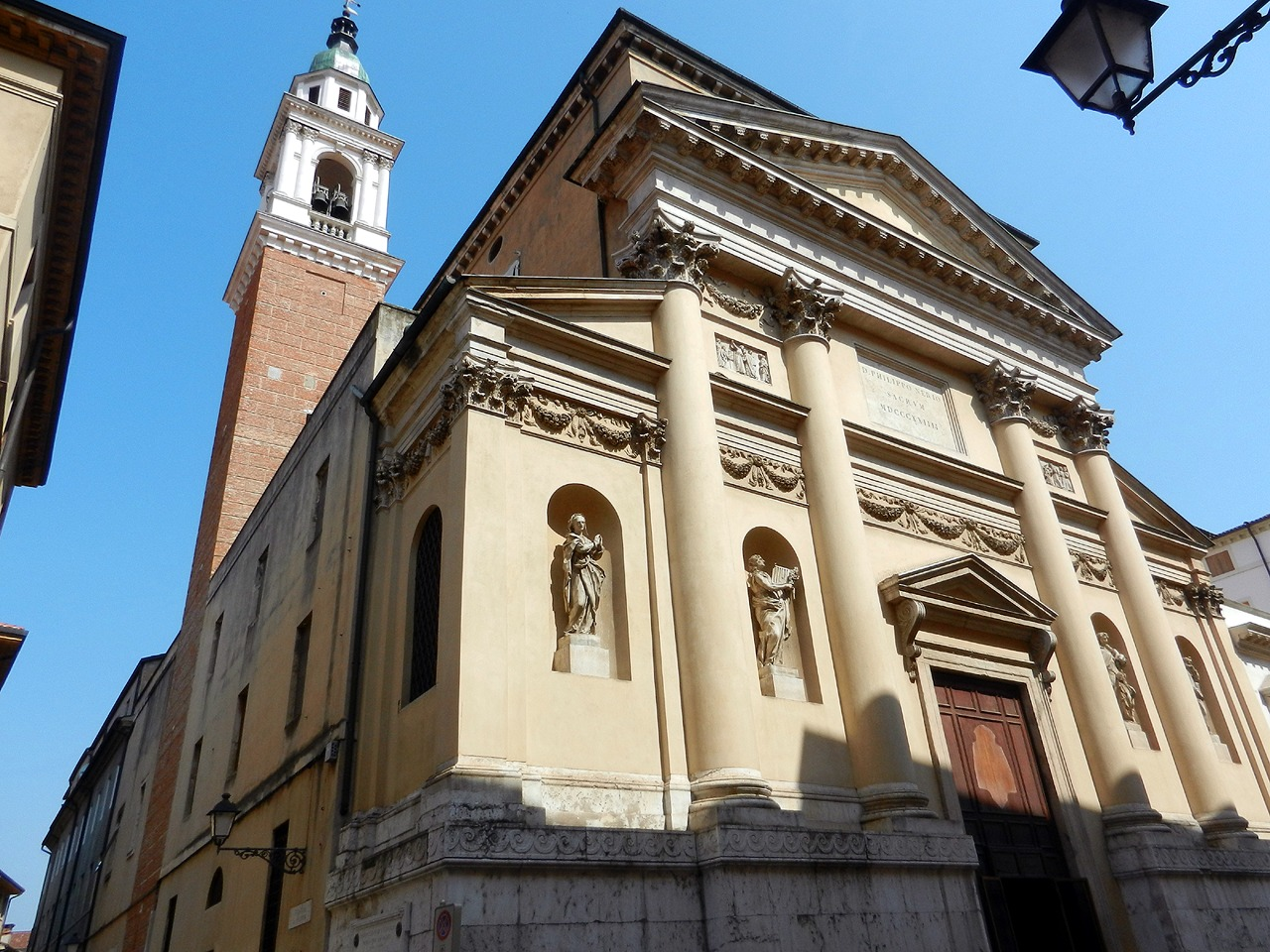 Vicenza - Chiesa di S. Filippo Neri